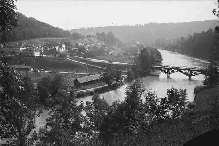 Bern-Felsenau, alte Felsenaubrücke nach Bremgarten